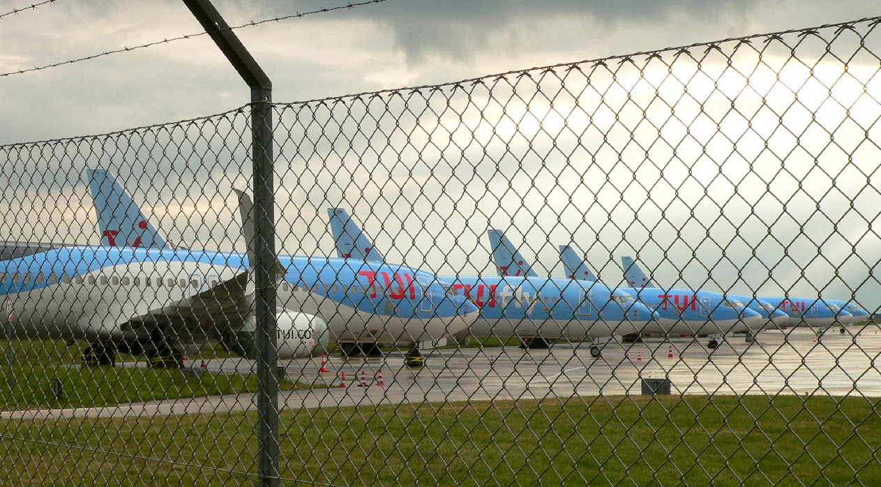 Geparkte Flugzeuge am Flughafen Langenhagen infolge des weitgehend eingestellten Flugverkehrs aufgrund der Corona-Pandemie